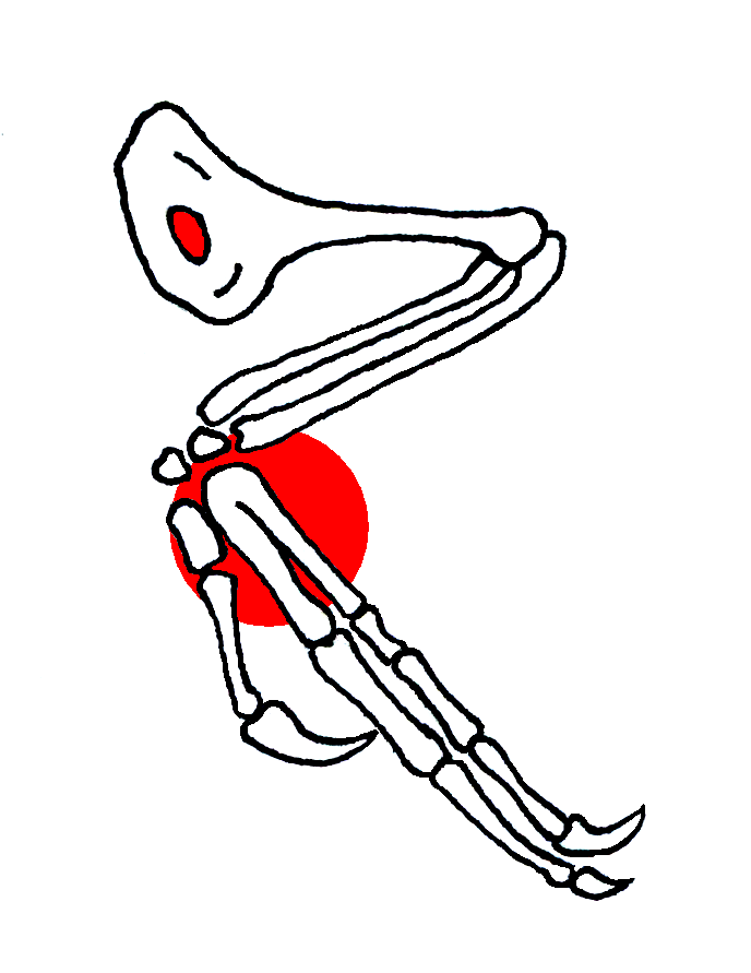 Rekonstruktion des Flügels des fossilen Vogels Confuciusornis sanctus, verändert nach Chiappe et al. 1999. Rot: Das Foramen im Deltopectoralkamm und das proximale Verschmelzen der Mittelhandknochen II und III zu einem Carpometacarpus sind charakteristisch für diesen Vogel aus der chinesischen Unterkreide. Typ: nachbearbeitete Fineliner-Zeichnung.